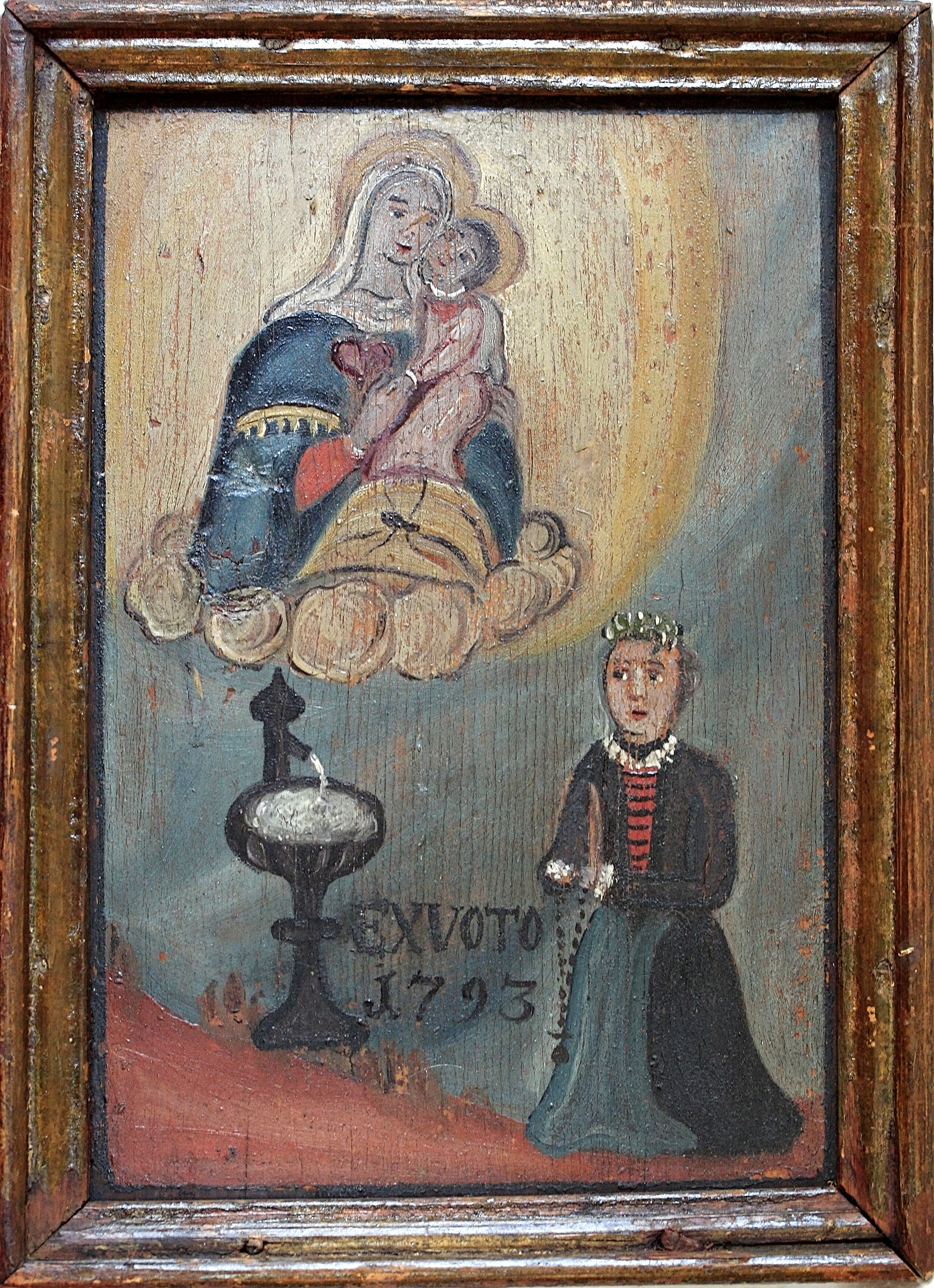 Das Votivbild mit dem Datum „1793“ zeigt eine betende Frau vor dem Brunnen, darüber die Muttergottes mit dem Kind. Offensichtlich hat eine Frau im Jahre 1793 Linderung oder Heilung durch die Quelle in Kirchwald erfahren und durch dieses Bild zum Ausdruck gebracht. Der Künstler sowie die dargestellte Frau sind unbekannt. Das Bild hing ursprünglich in der Wallfahrtskirche Mariä Heimsuchung im Nußdorfer Ortsteil Kirchwald. Über den Kunsthandel kam es 2011 wieder nach Nußdorf und befindet sich seitdem in Privatbesitz.